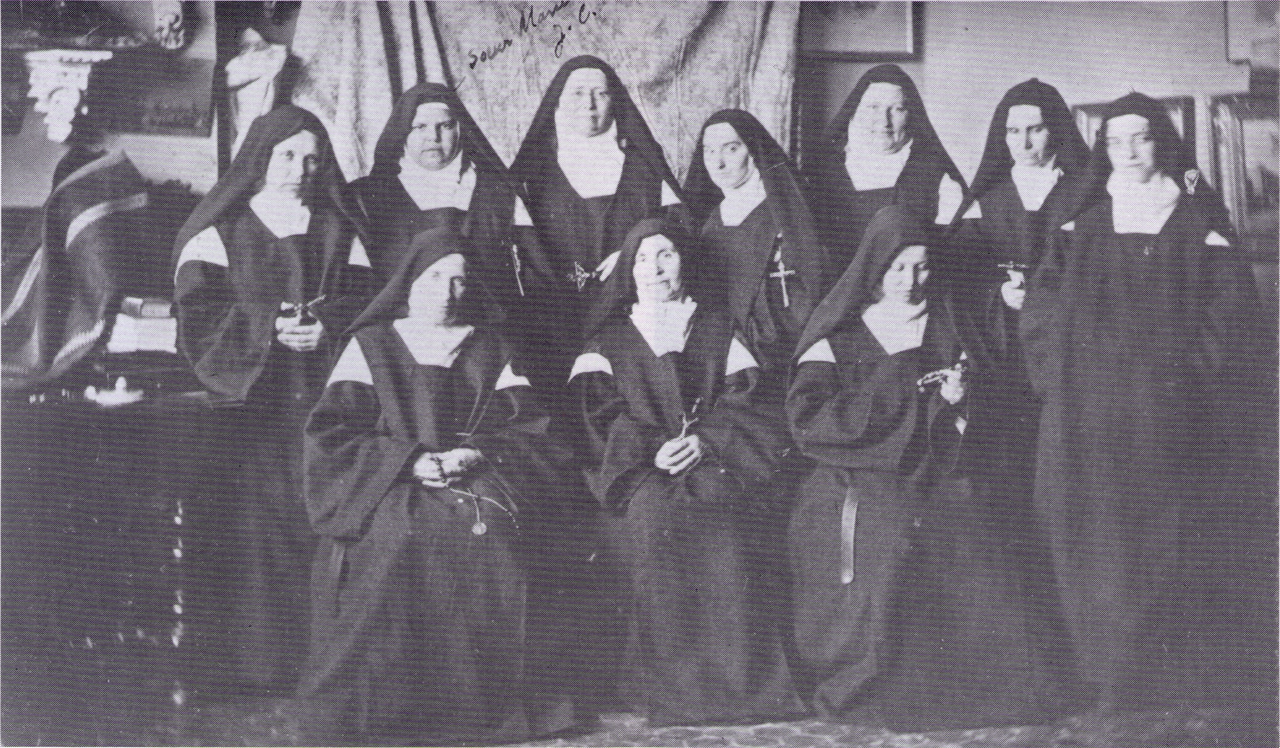 Die Gründerinnen des Konvents von Bethlehem vor der Abreise ins Heilige Land: Mariam Baouardy (stehend, 2. v.l.) und ihre Mitschwestern (unbeschuhte Karmelitinnen) im August 1875 im südfrz. Kloster Pau (westliches Pyrenäenvorland).